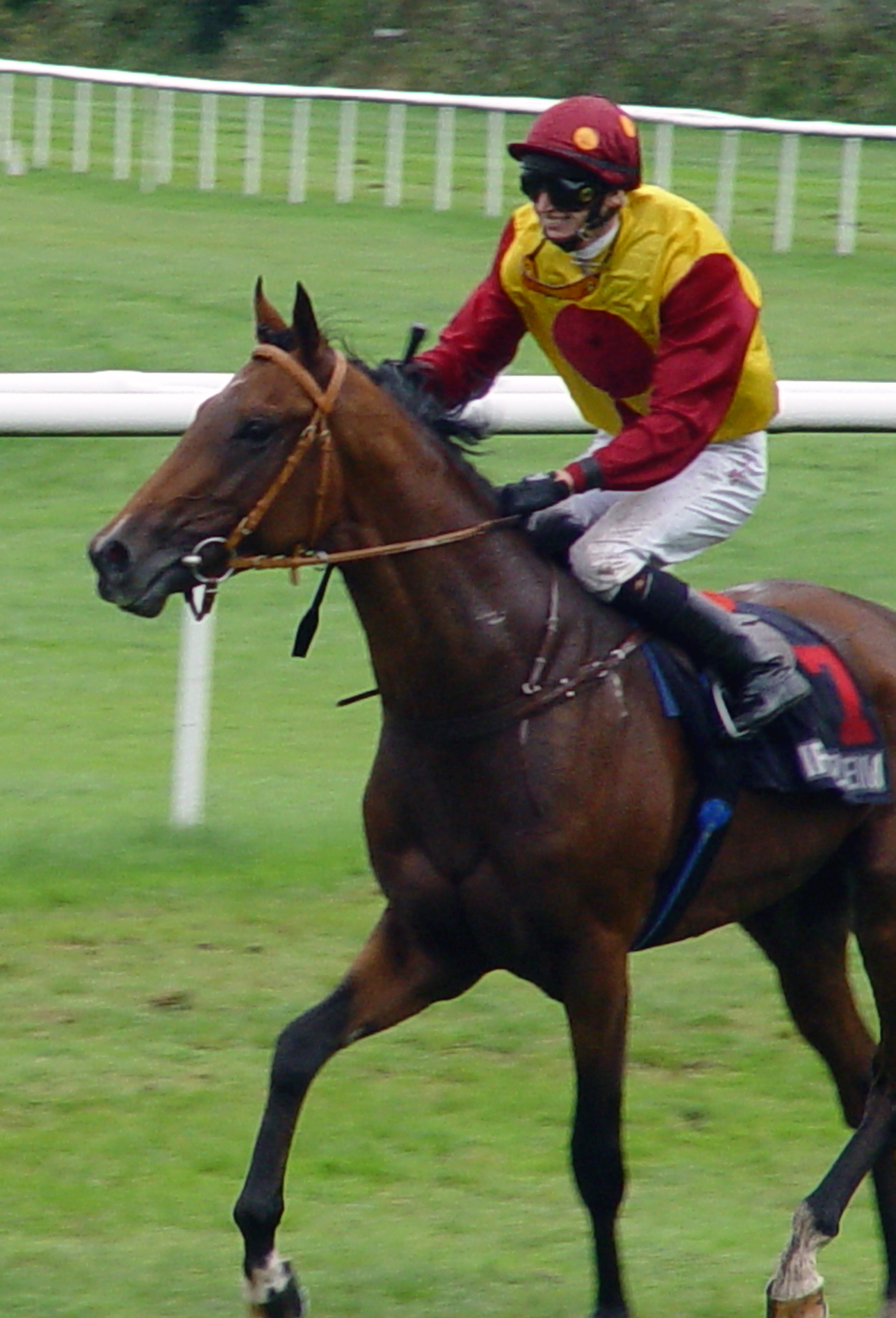 Gewinner des Großen Preis von Baden am 3.09.06. Gewinnerpferd ist Prince Flori mit Jokey F.Minarik, Stall Reni